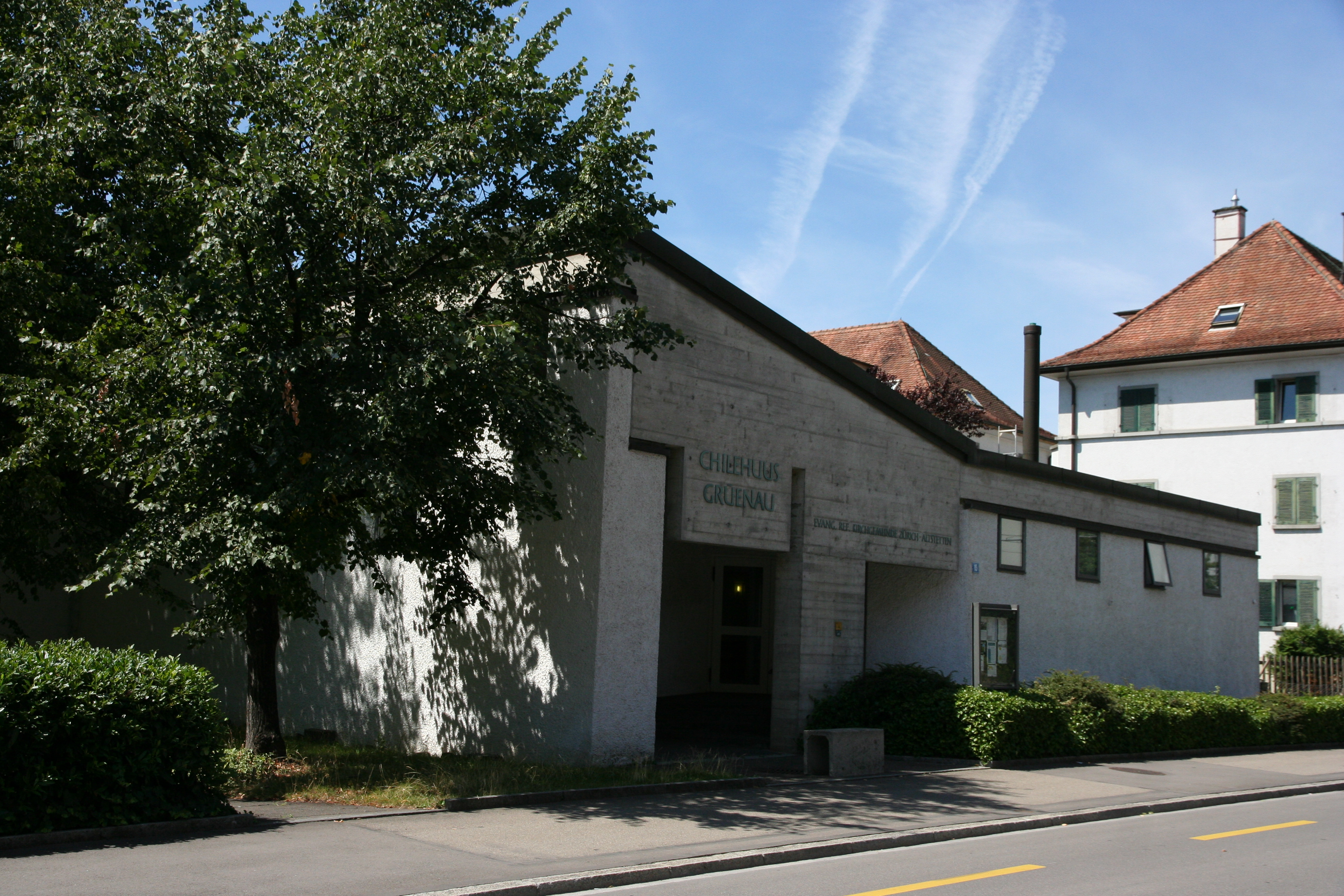 Evangelisch-reformiertes Kirchgemeindehaus Grünau in Zürich-Altstetten